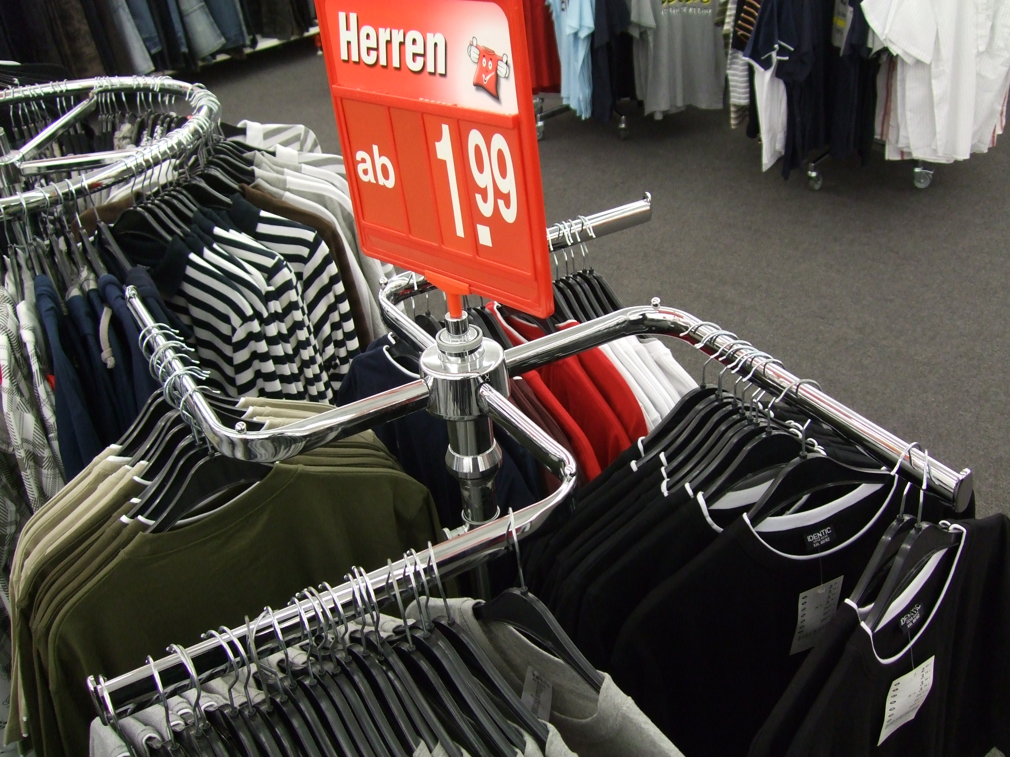 Ein sich im deutschen Textil-Discounter KiK befindender Kreuzwinkelständer